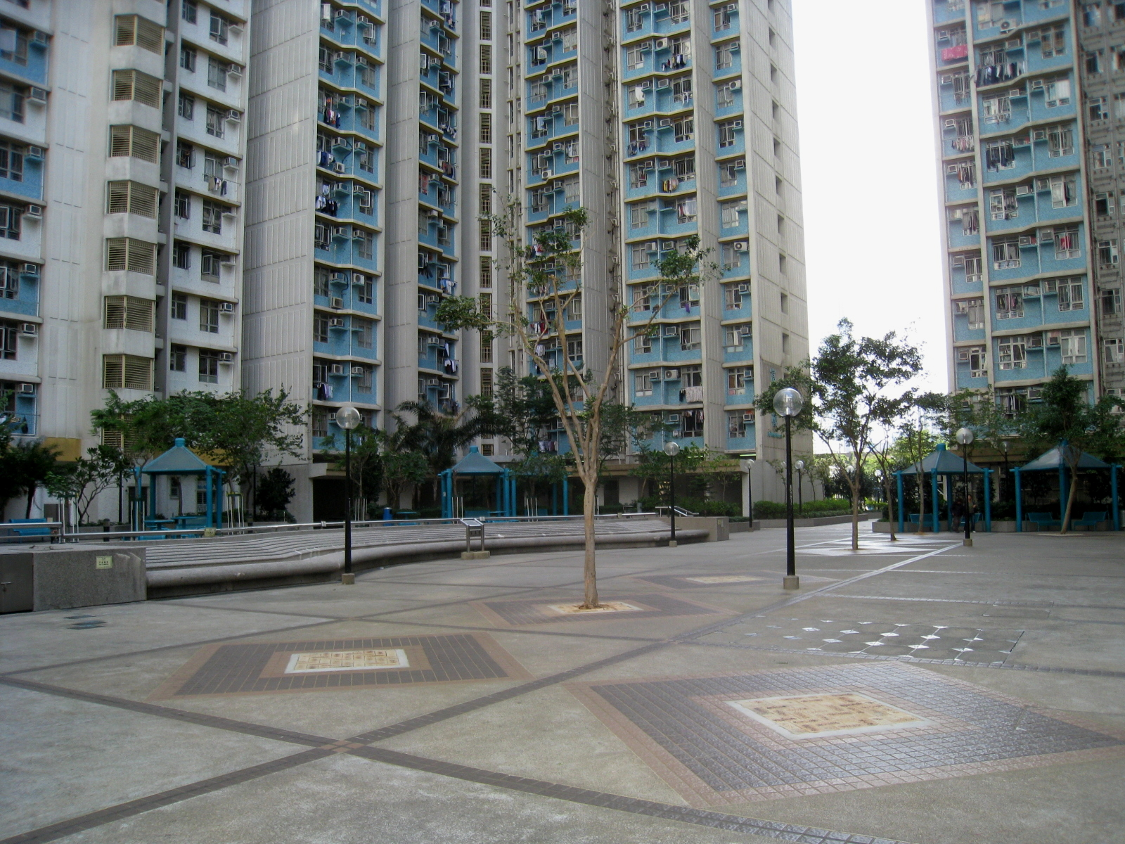 富昌邨 Fu Cheung Estate Garden